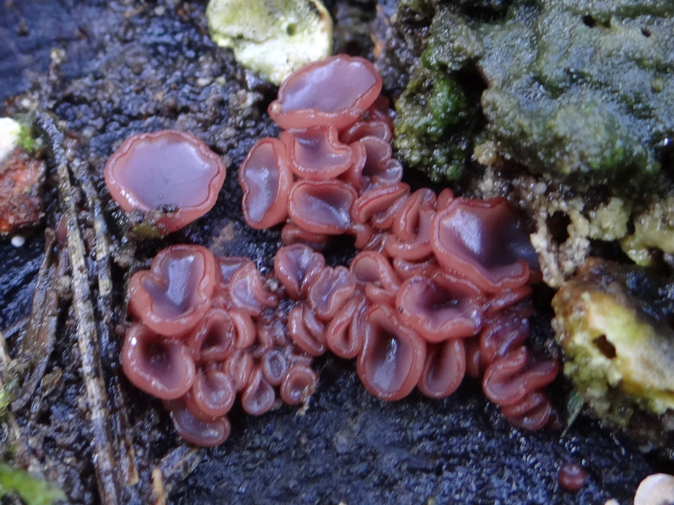 Ascocoryne cylichnium (location: Poland, Kamionna (województwo małopolskie)